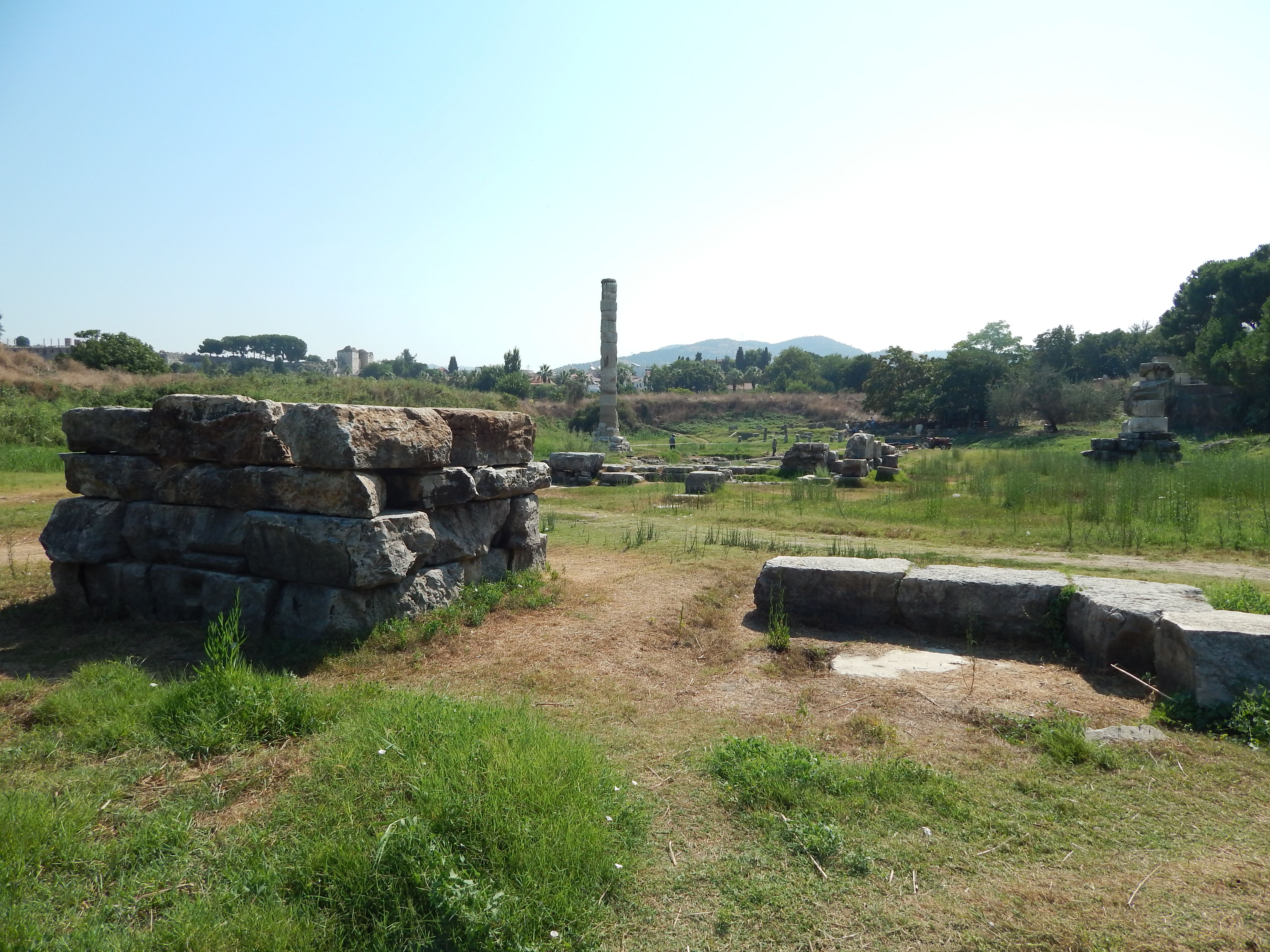 Apollo Tapınağı...